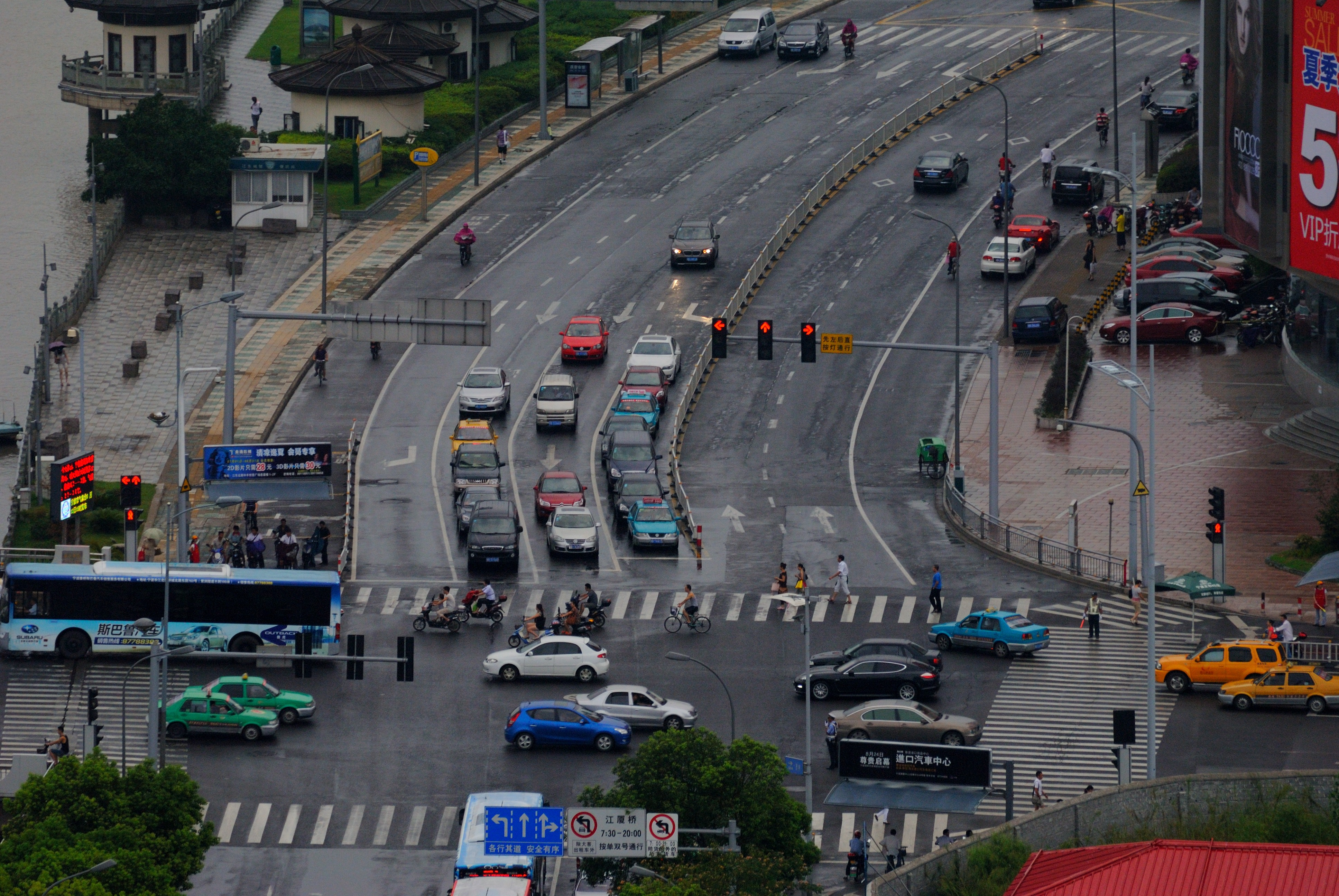 宁波中山路-江东北路路口